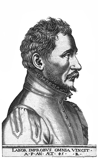 Portrait Ambroise Pare